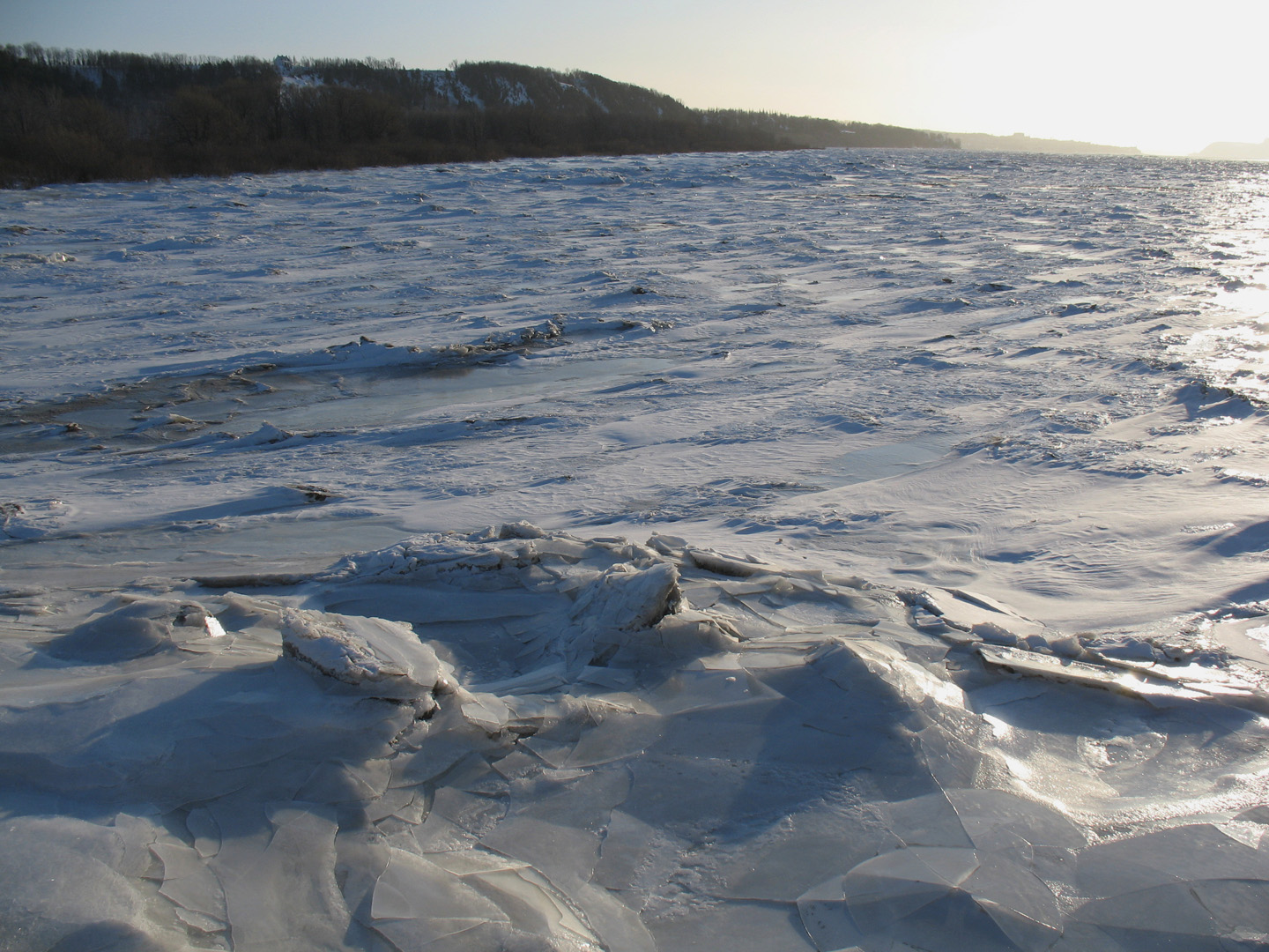 Le fleuve Saint-Laurent au pont de l'Île d'Orléans près de Québec. Province de Québec, Canada